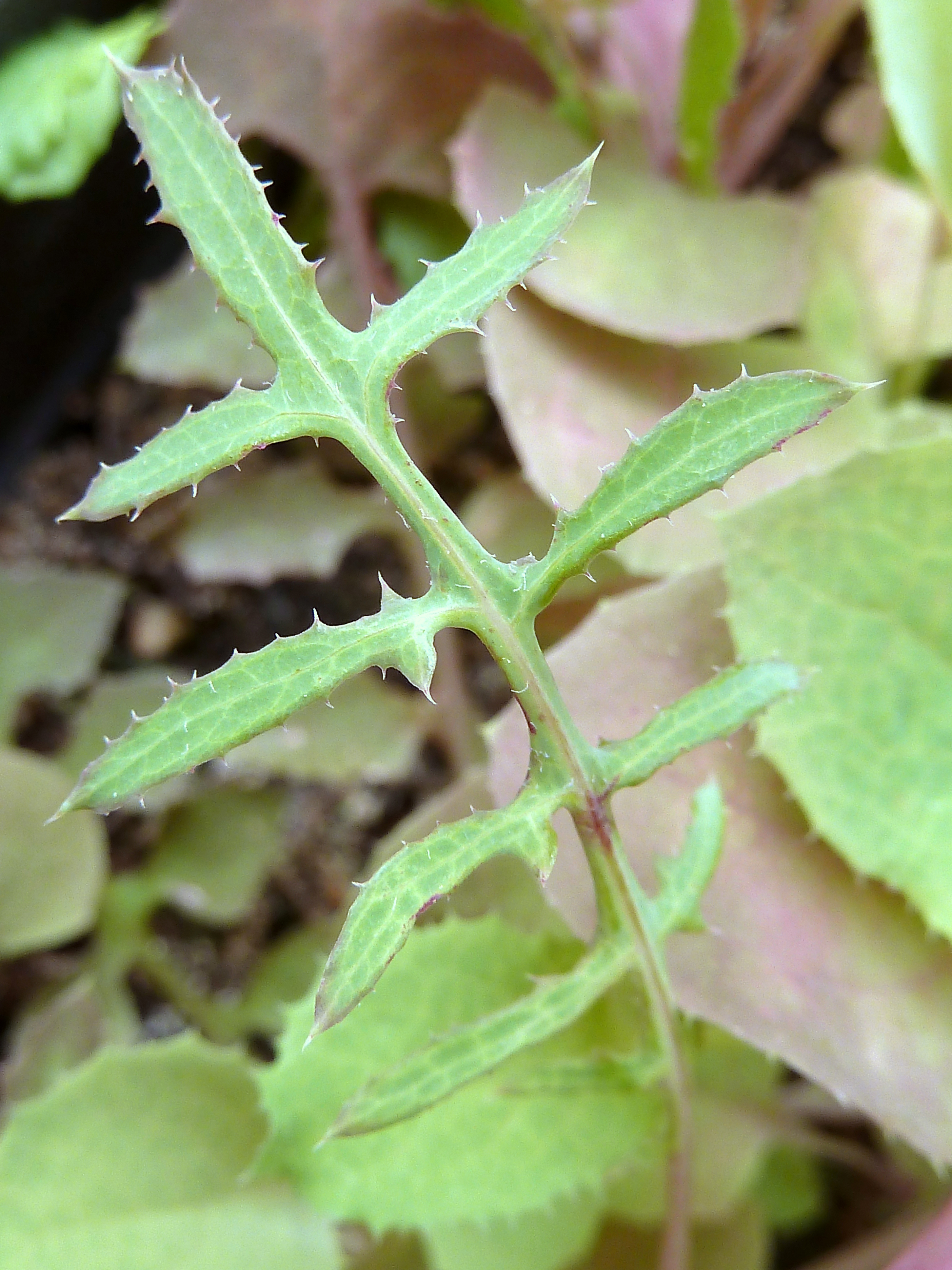 Sonchus tenerrimus - ( cerraja menuda, cerraja tierna,...) - Hoja caulinar. - San Antonio, 12, Albatera (Provincia de Alicante, España).